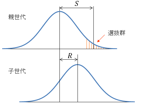 育種における選択に対する応答（回帰）